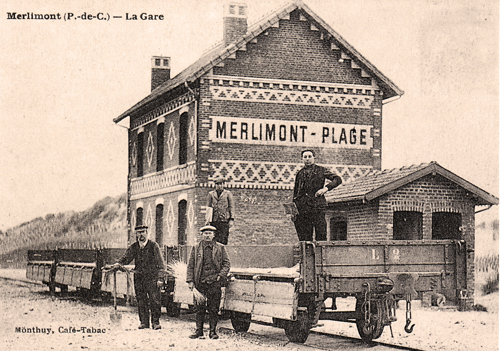 Employés de la ligne Berck-Plage - Paris-Plage en gare de Merlimont.